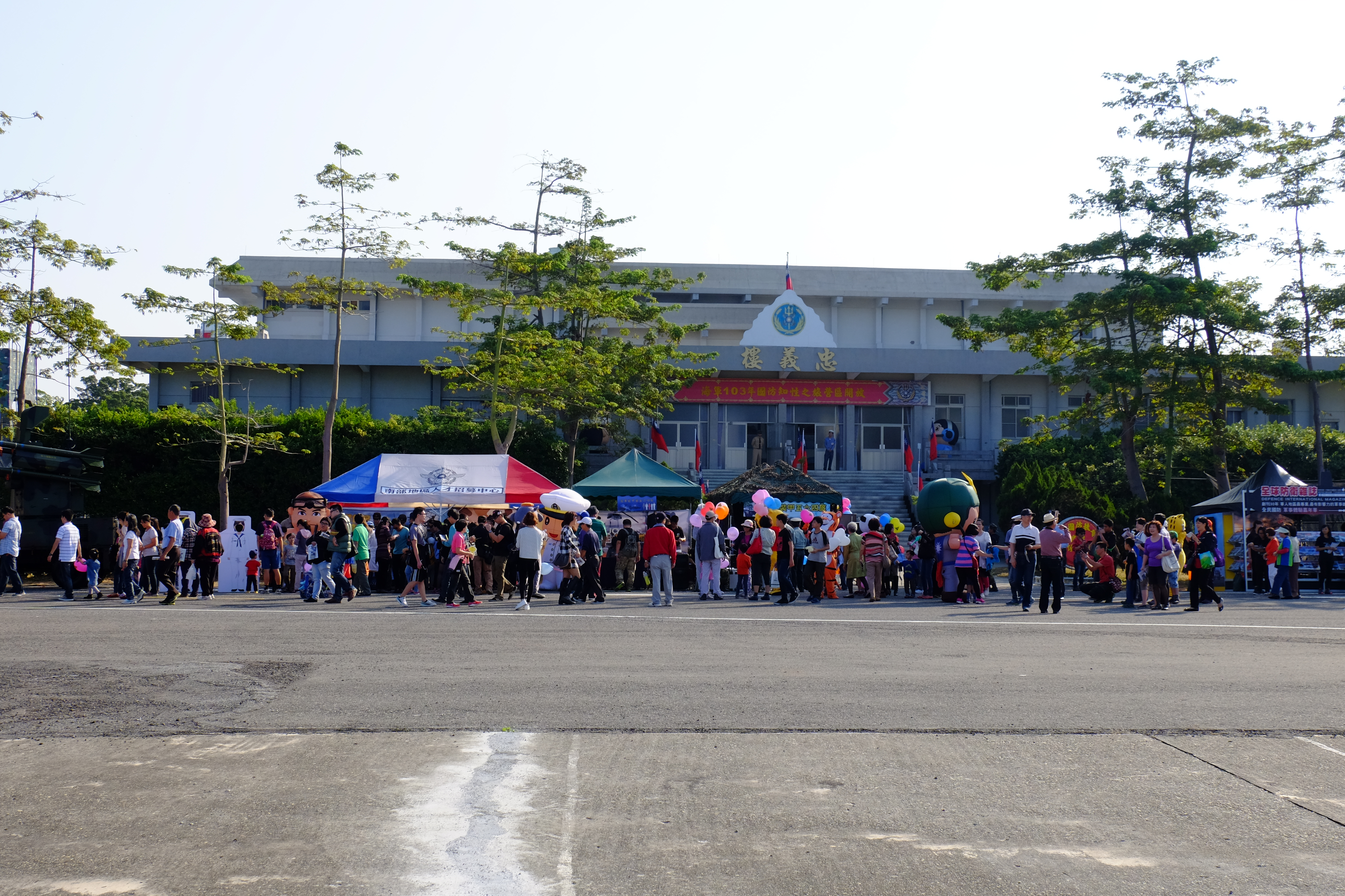 2014年左營軍港營區開放活動，左營軍港東碼頭忠義樓前，國軍南部地區人才招募中心與陸軍裝甲第五六四旅人才募集攤位。